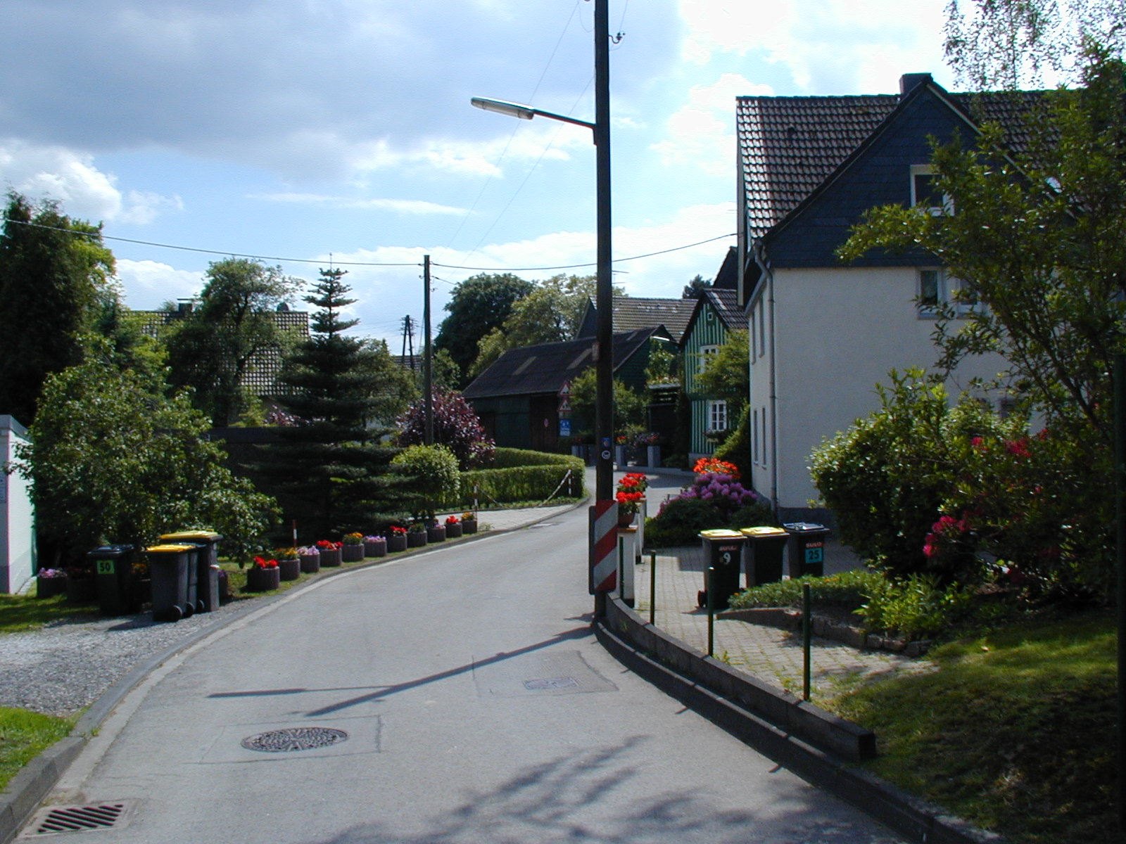 In der Hardt, Wuppertal